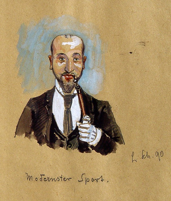 Der Verleger Hugo Bruckmann, Pfeife rauchend, 1890. Aquarell auf braunem Papier, ca. 25 cm x 34cm Blatt aus dem Album/Gästebuch (aus den Jahren 1886-1898) der Münchner Mittwochsgesellschaft, die der Verleger Hugo Bruckmann (1863-1941) im Zentral-Café Ungerer, Dachauer Str. 9 gegründet hatte. Unter den Mitgliedern waren neben Scheuermann und Bruckmann der Verleger Edgar Hanfstaengl (1842-1910), die Maler August Leonhardi (1867-1931), Anton Mangold (1863-1907) und Moritz Röbbecke (1857-1916), Winfried von Miller (1854-1925) und Otto Seitz (1846-1912)